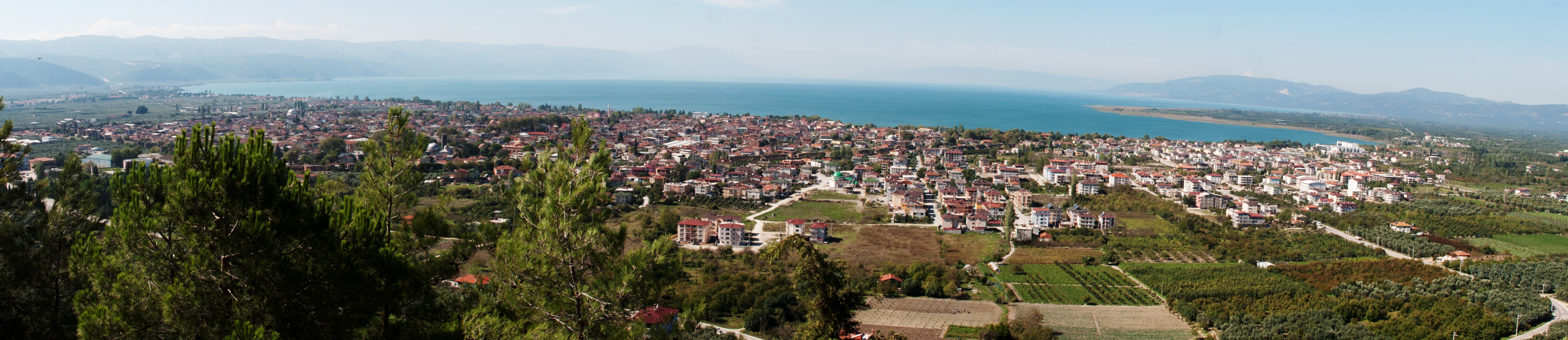 Abdulvahap Sancaktarî Türbesinden panoramik İznik şehri, İznik Gölü